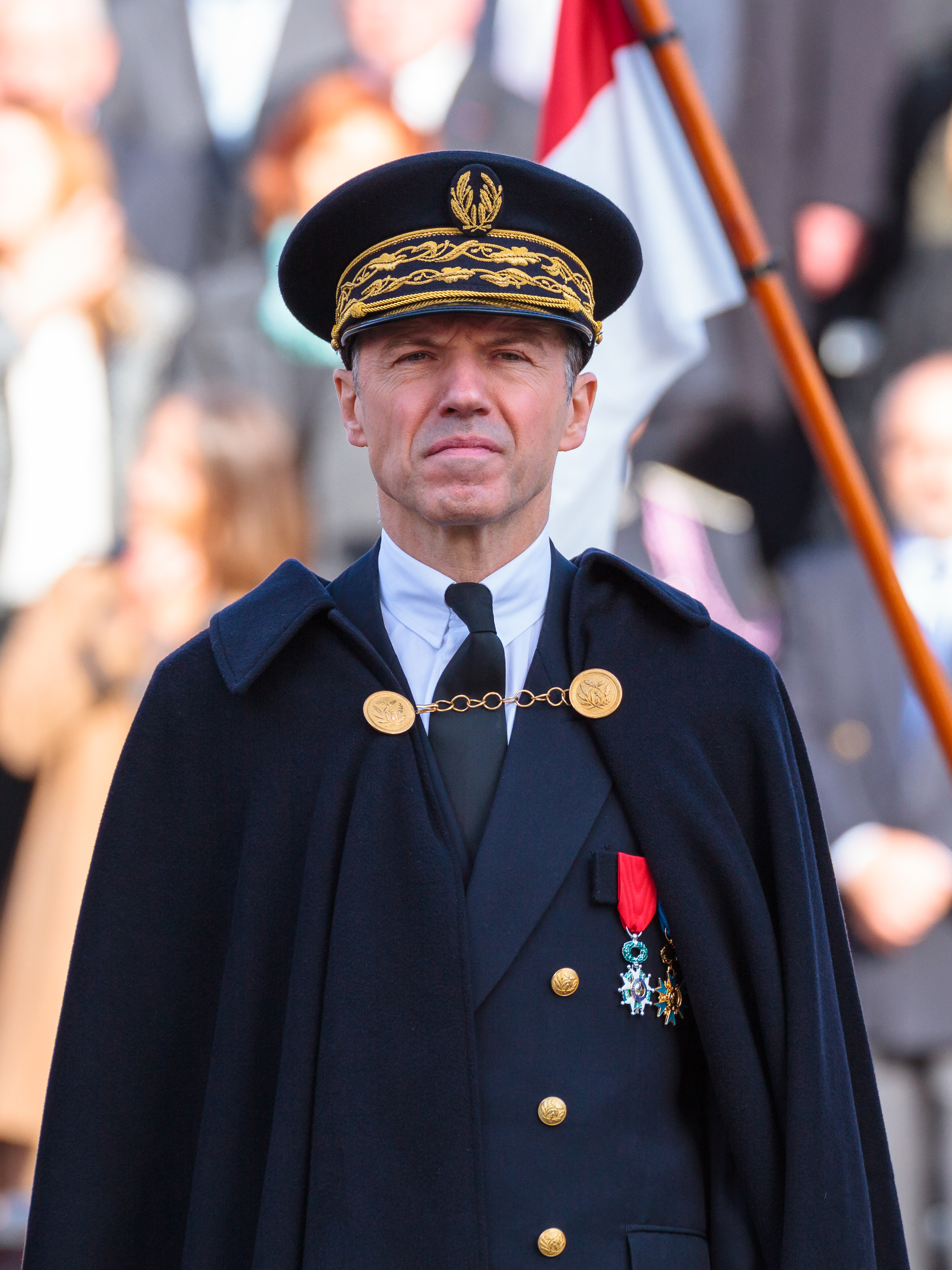 Pascal Mailhos, préfet de Midi-Pyrénées lors des commémoration du 11 novembre à Toulouse en 2014